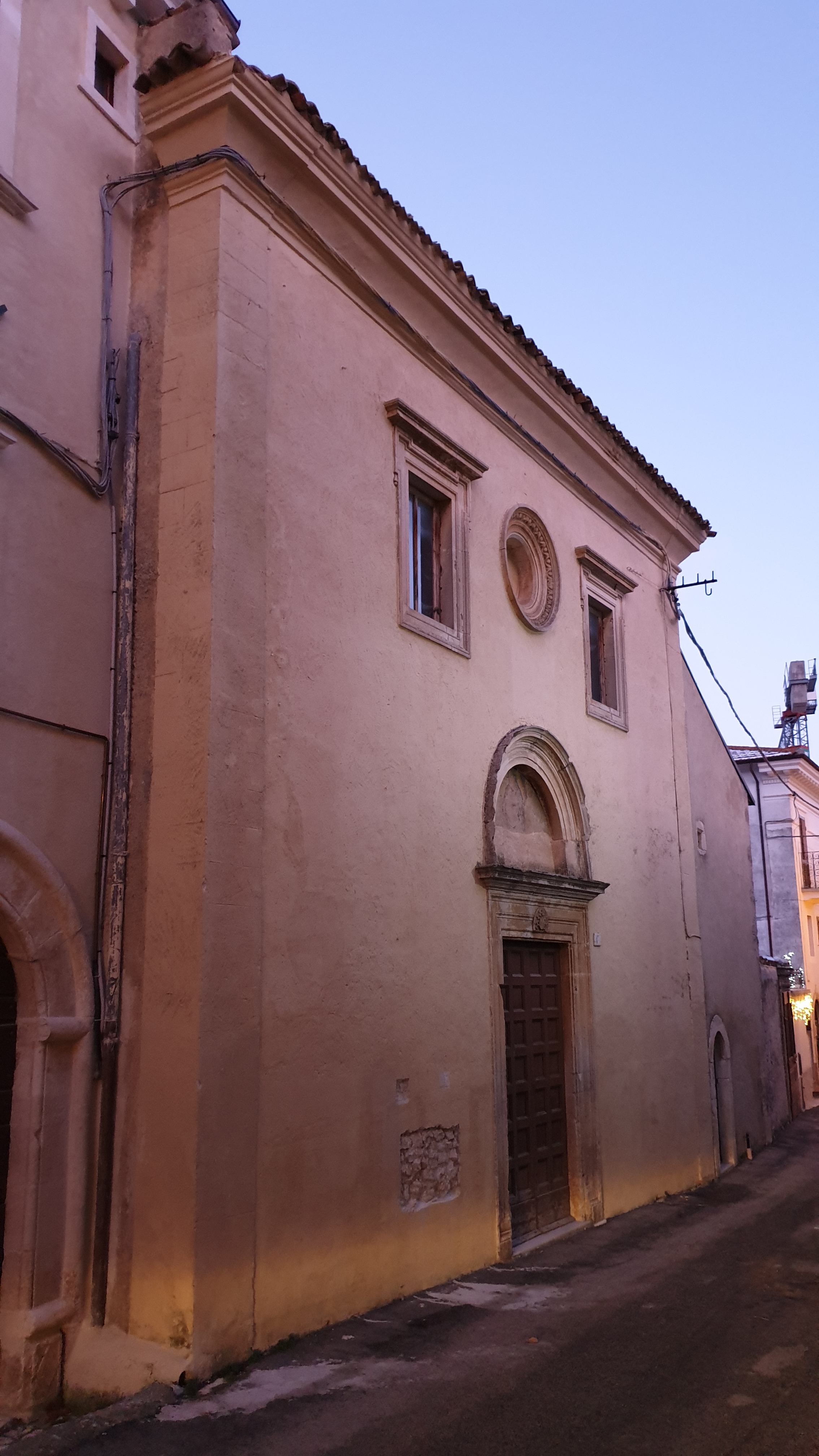 Carapelle Calvisio (AQ) - Chiesa di San Francesco d'Assisi